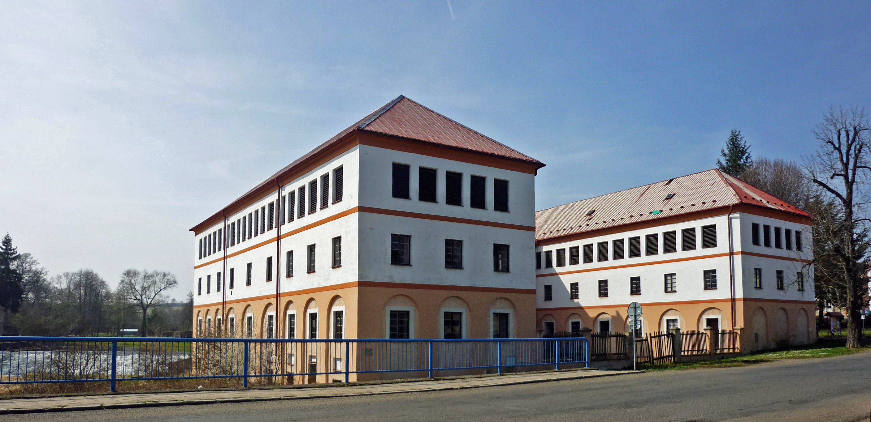 Ehem. Brauerei (Mälzerei) in Michelob (Měcholupy)